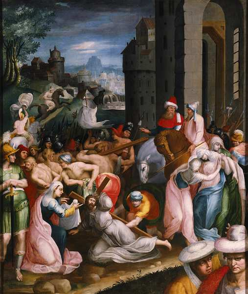 La montée au Calvaire, Toussaint Dubreuil, fin du XVIe siècle, peinture sur toile, Musée national de la Renaissance, Ecouen. Cette oeuvre témoigne de l'activité du peintre dans le domaine des scènes religieuses. Il s'agit de la scène de la Crucifixion. Les multiples plans donnent au tableau une théâtralité renforcée par la vivacité des coloris choisis par Toussaint Dubreuil. Enfin, cette oeuvre s'inscrit dans le style maniériste.